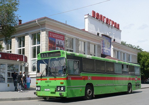 Центральный автовокзал Волгограда